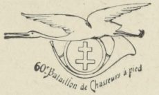 Cigogne d'Alsace, de la fidélité doux emblème ; Croix de Lorraine, de notre foi pur symbole ; Cor ou olifant lançant l'appel suprême ; Blason harmonieux telle fut notre idole.